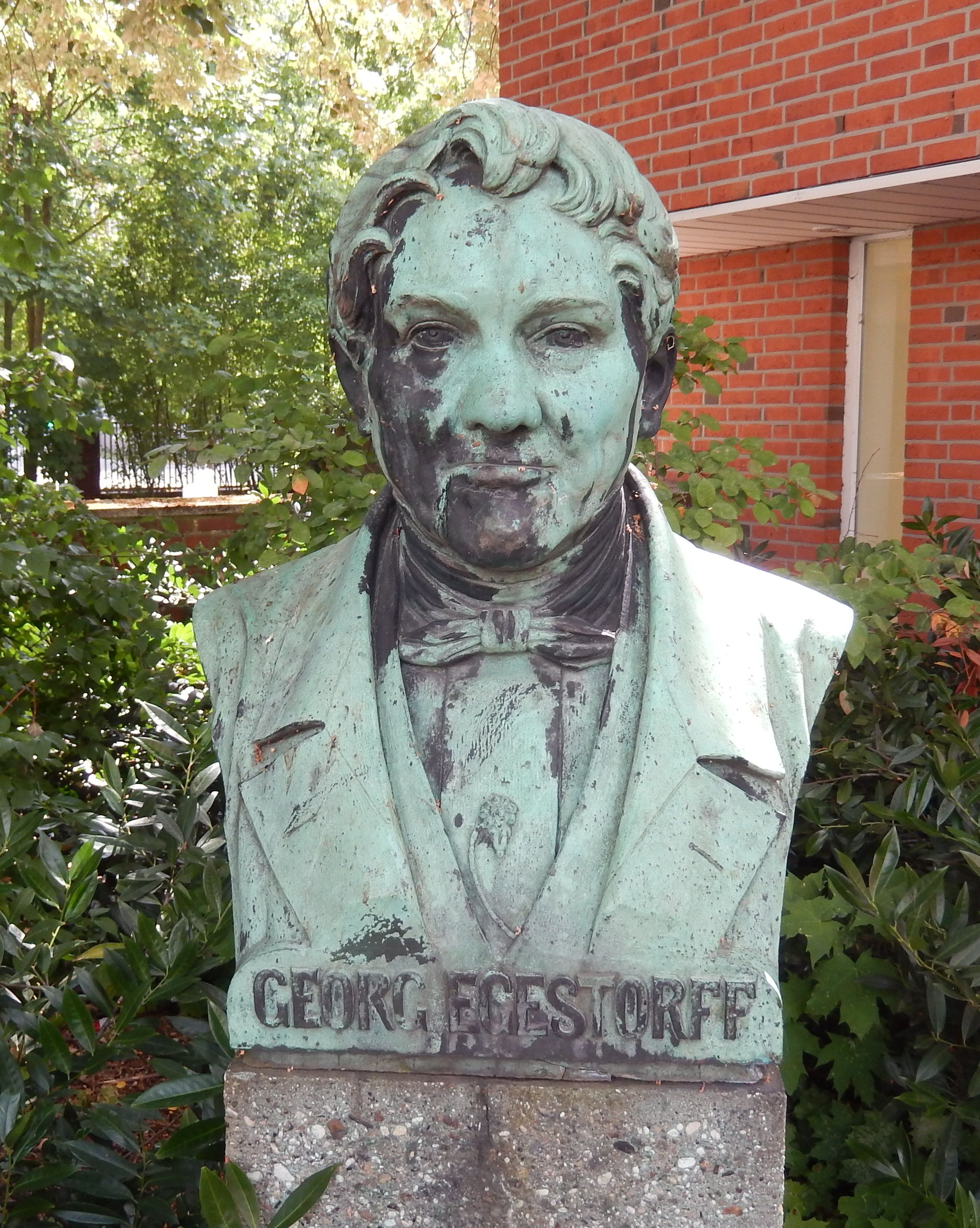 Büste Georg Egestorffs an der Egestorff-Schule in Hannover